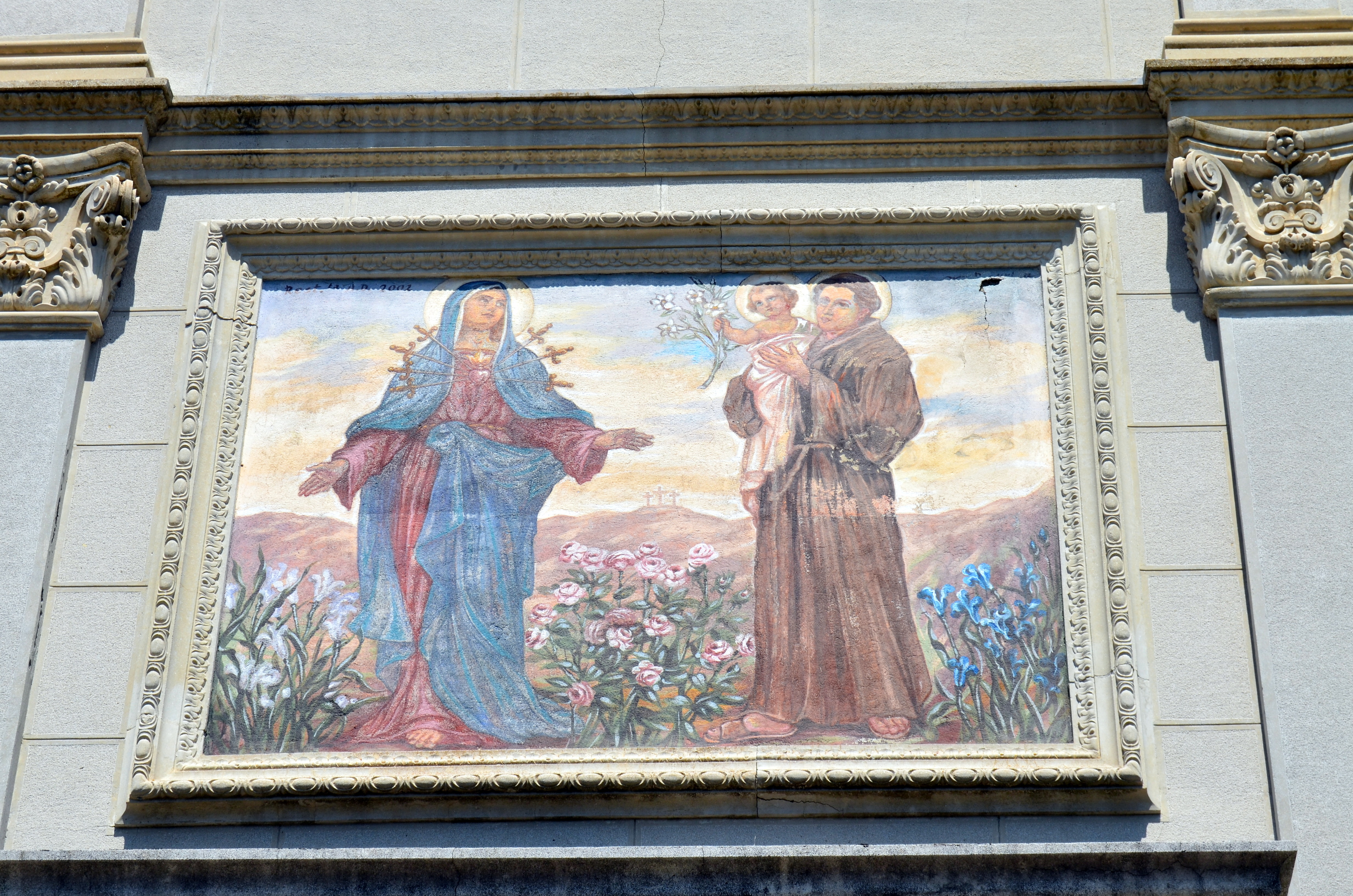 Chiesa di Sant'Antonio di Pontori, Ne, Liguria, Italia